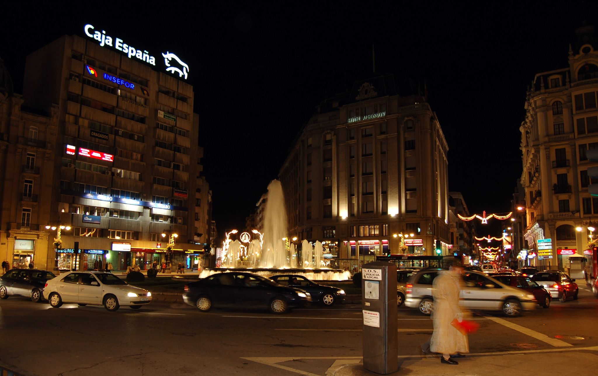 Plaza de Santo Domingo por la noche, León